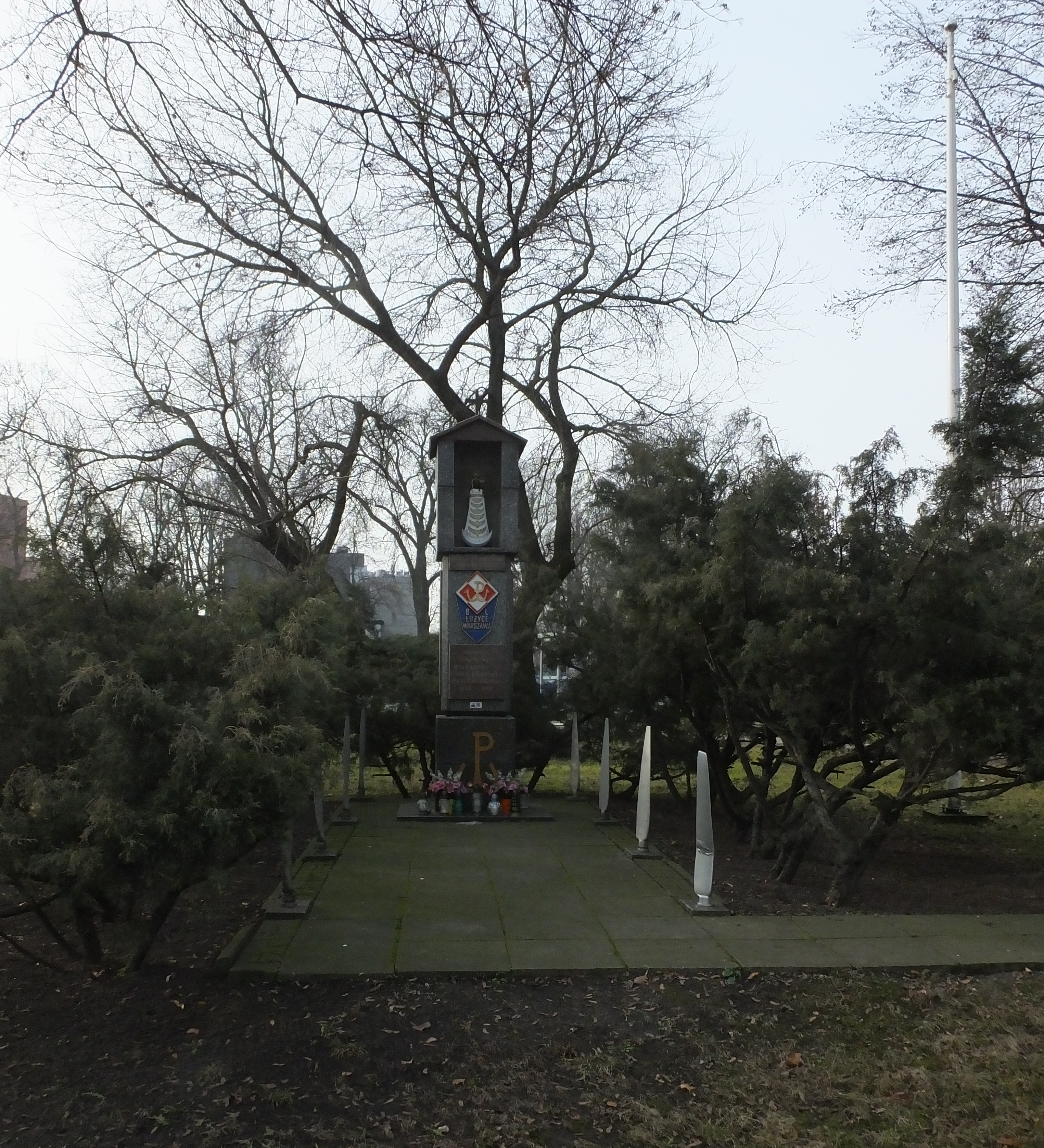 Kapliczka Matki Bożej Loretańskiej – pomnik pamięci żołnierzy Bazy Lotniczej Armii Krajowej „Łużyce” w Warszawie